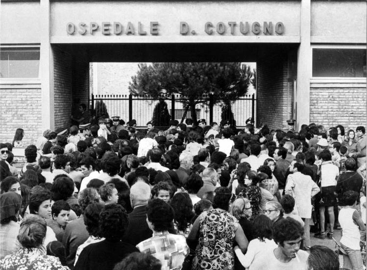 Quando Napoli sconfisse il colera nel 1973